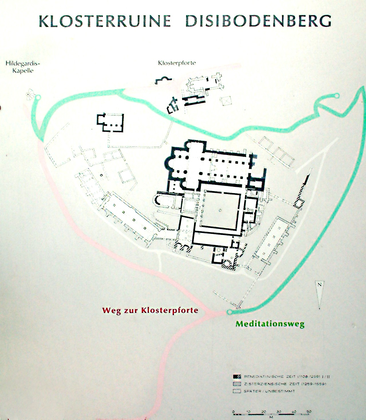 Plan der Klosterruine Disibodenberg und Park